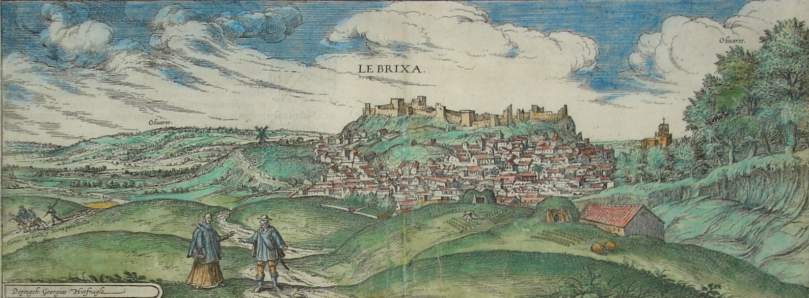 Lebrija y Setenil. Grabado coloreado. De Civitates Orbis Terrarum.